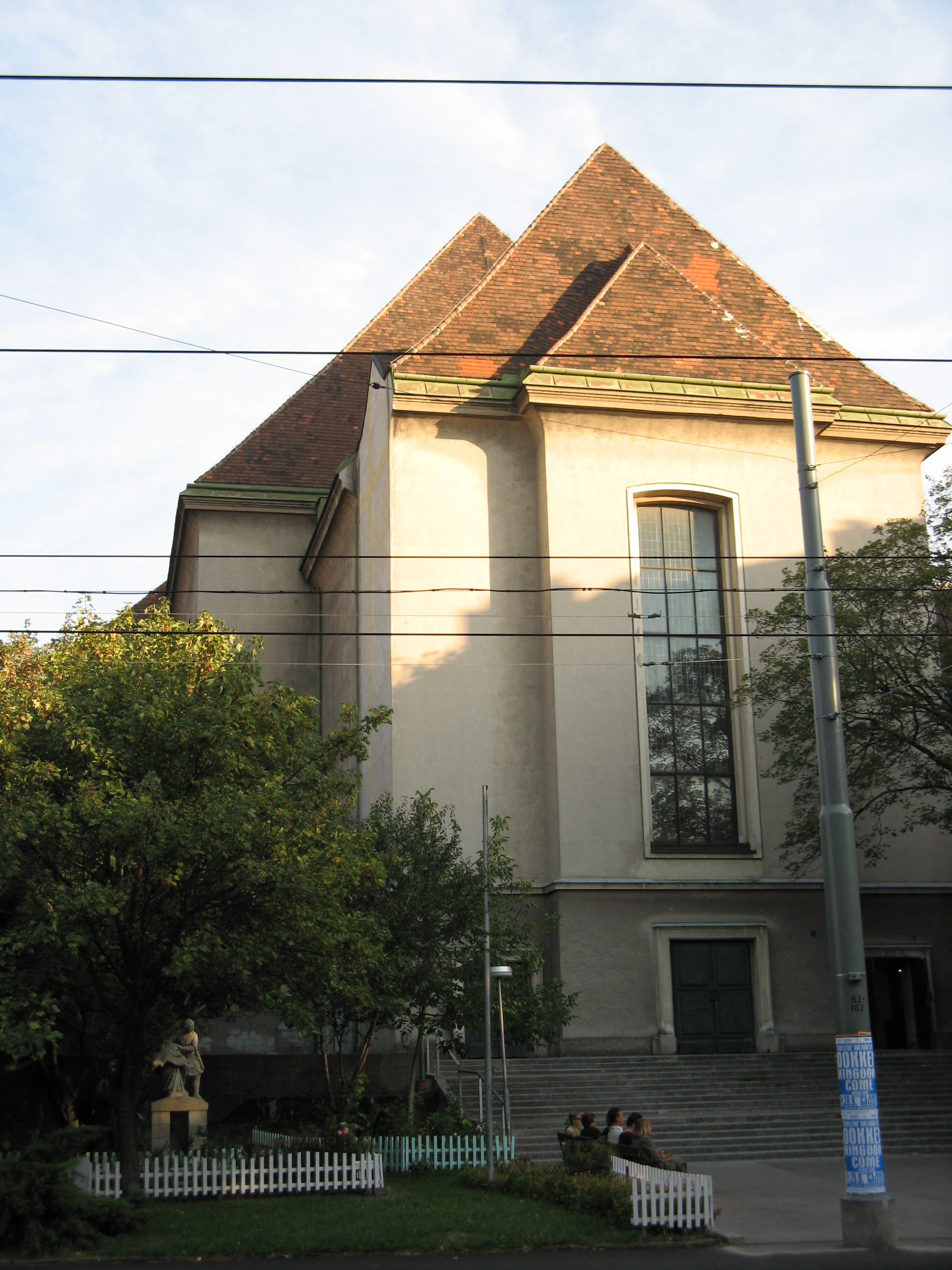 Pfarrkirche Maria Empfängnis (1949-53) von Helene Koller-Buchwieser und Hans Steineder in Wien-Meidling